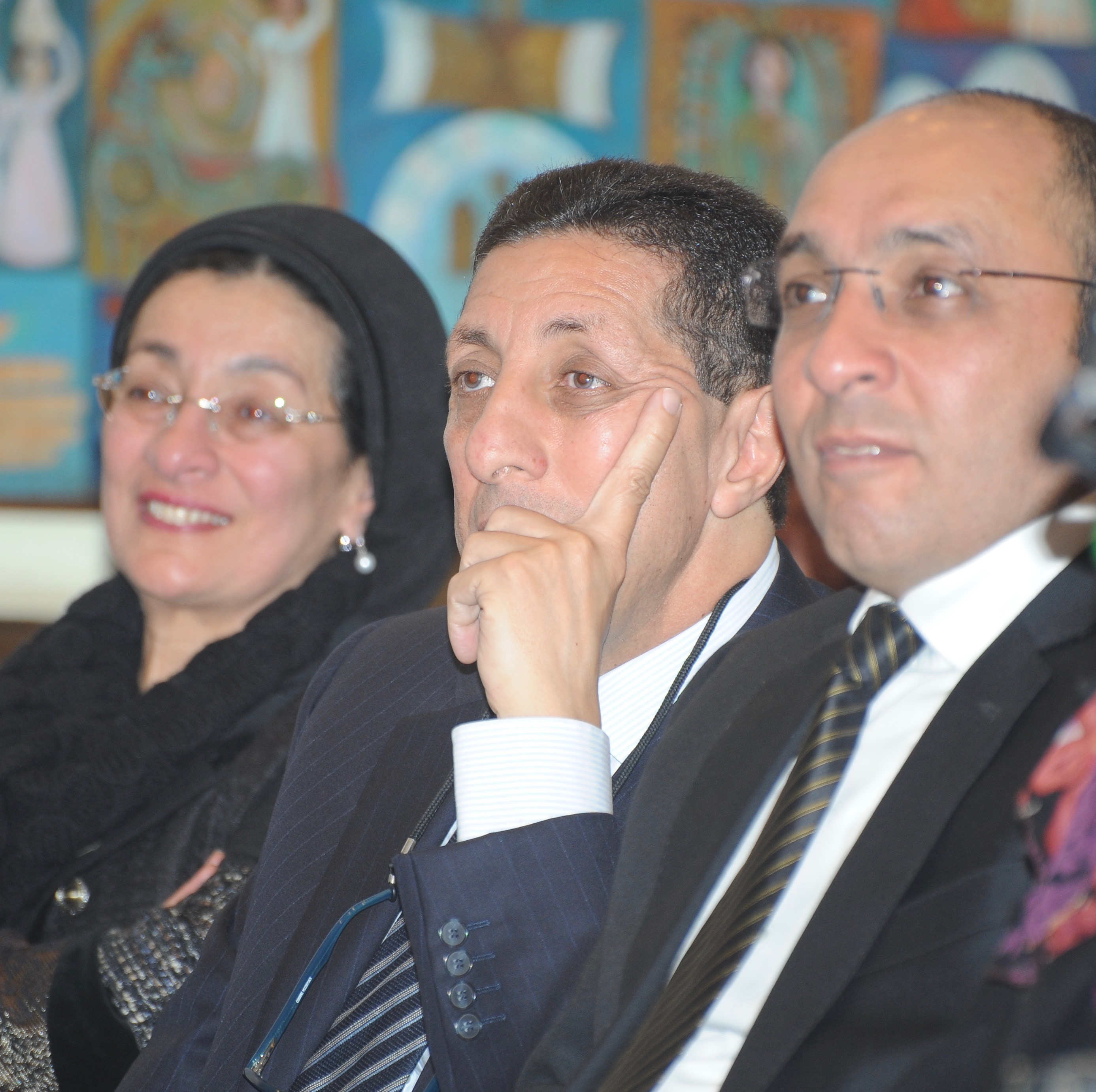 أبناء الأديب الراحل عبد التواب يوسف.